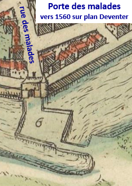 Porte des Malades vers 1560. Extrait du plan de Lille Deventer ou Guichardin